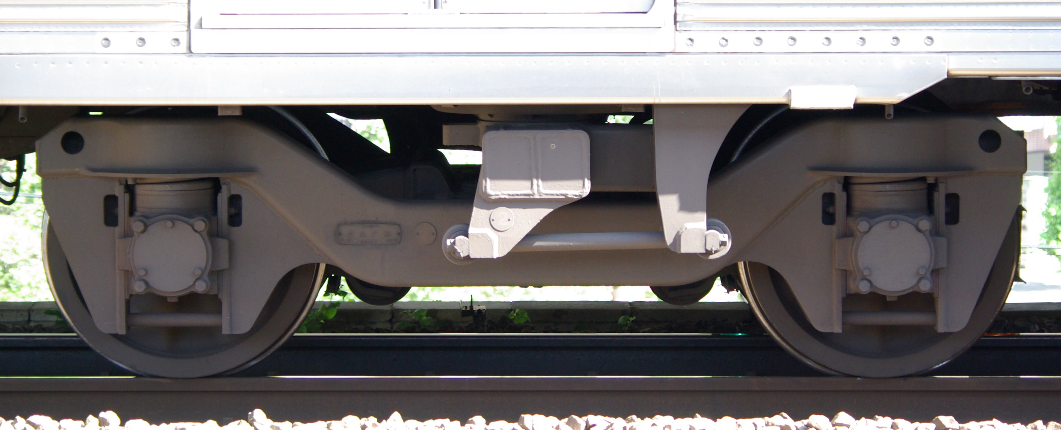 東急8500系 TS-815C付随台車（サハ8921号）